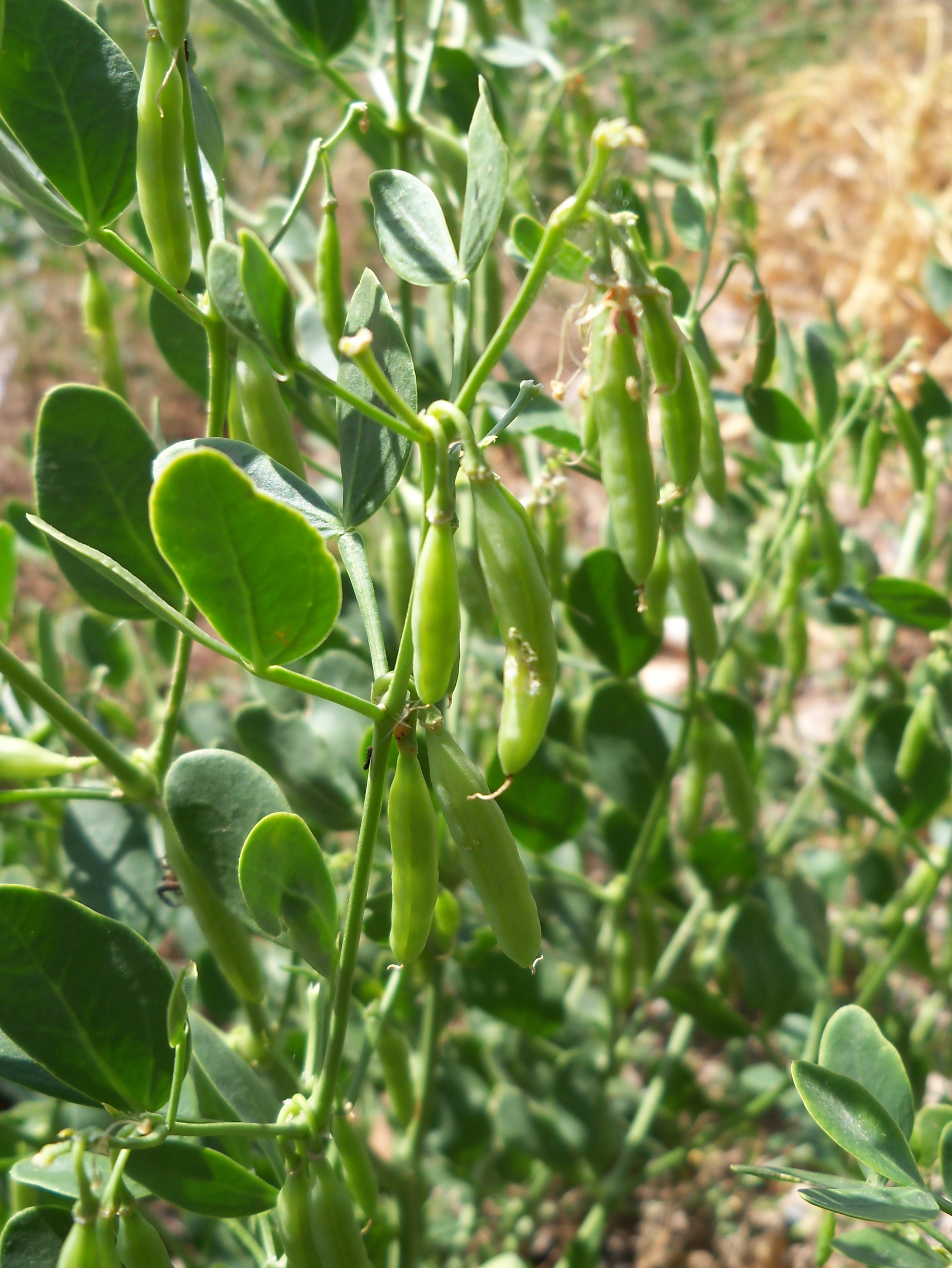 Zygophyllum fabago (Morsana) : Frutos inmaduros in situ - Dique de la Rambla del Cañarete, Águilas (Murcia, España).